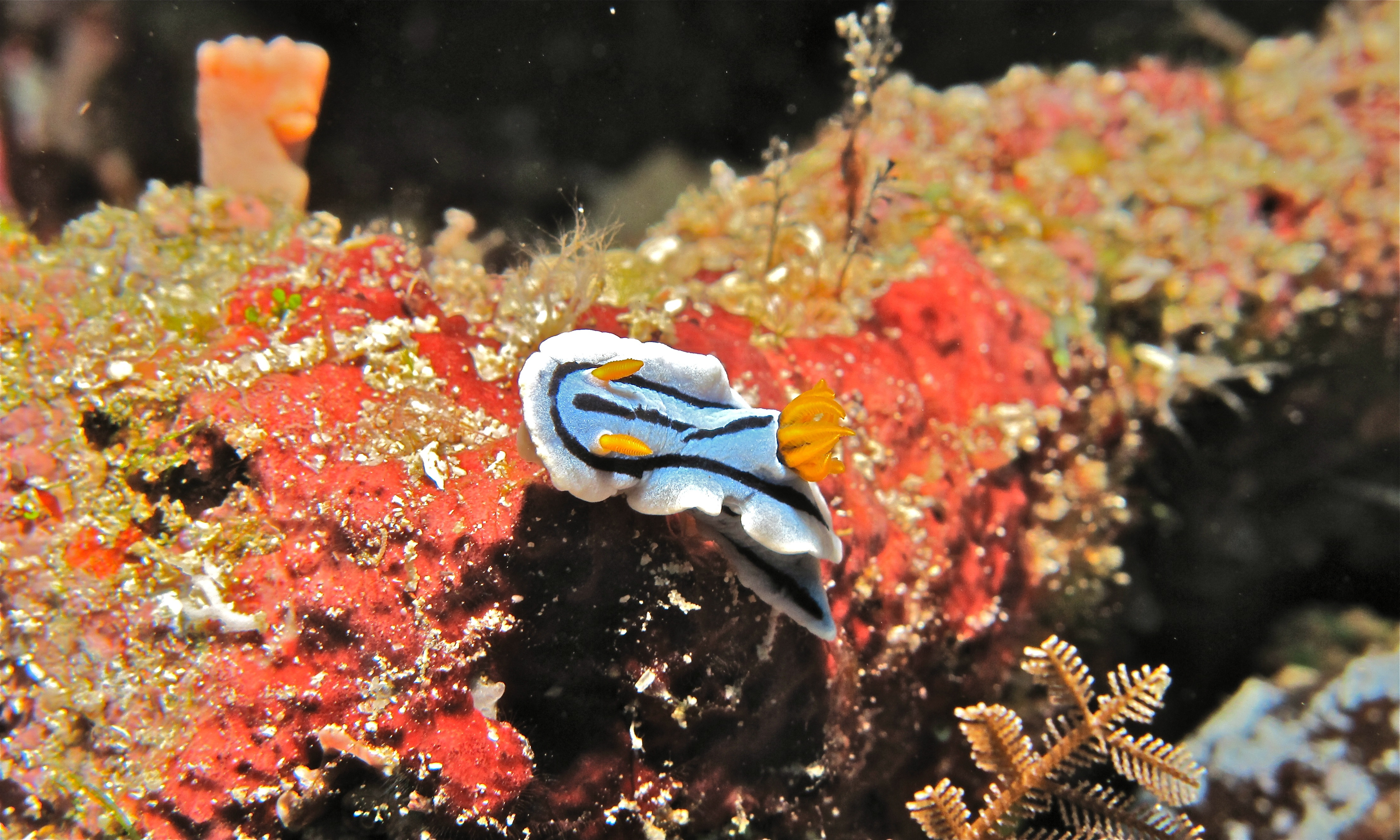 Muka, Bunaken Island, Sulawesi, INDONESIA